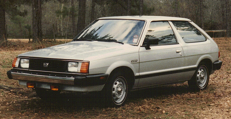 1984 Subaru Leone Turismo/Subaru DL. Photo taken February 1986.